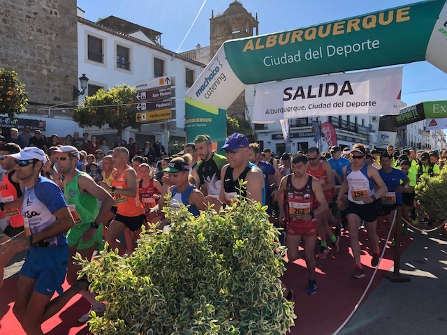 Media Maraton de Alburquerque